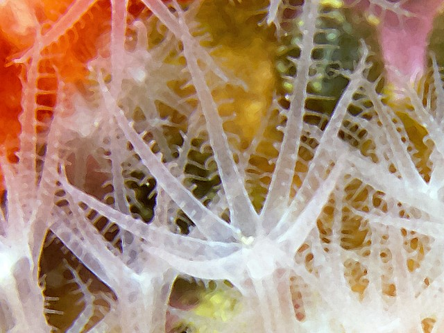 Corallium rubrum, pólipo